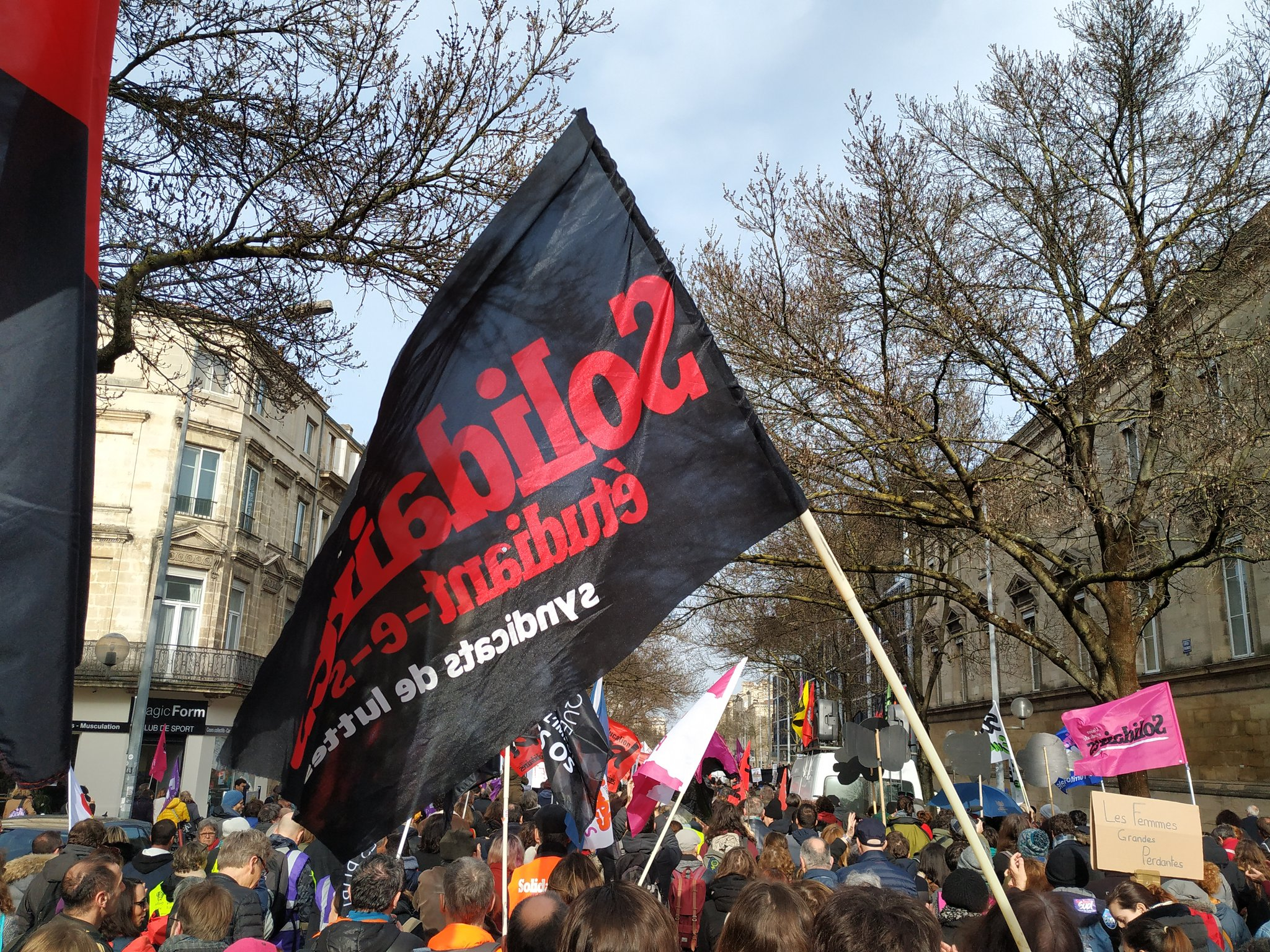 Drapeau de Solidaires étudiant-e-s dans la manifestation contre la réforme des retraites à Bordeaux le 24 Janvier 2020